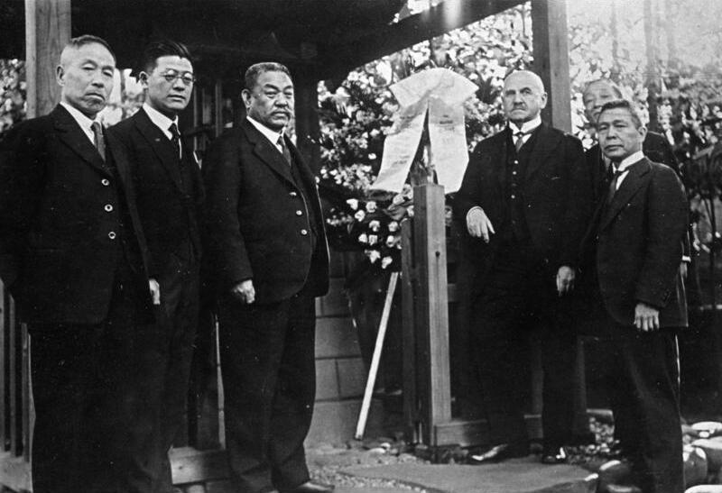 Georg Sultan, Japanbesuch Deutsches Auslandsinstizut Japan, Besuch von Geh. Rat Prof. Dr. Sultan im Kitasato- Institut in Tokyo. Prof. Dr. [Georg] Sultan stattete gelegentlich seiner Japanreise dem Kitasato- Institut einen Besuch ab, um dort im Namen des Instituts "Robert Koch" einen Kranz zu Ehren des verstorbenen Prof. Baron Kitasato, einem der ältesten Schüler Robert Kochs, niederzulegen. Das Bild zeigt Geh. Rat Sultan und verschiedene Herren des Kitasato- Instituts bei der Kranzniederlegung an dem Schrein des Verstorbenen. Die einzelnen Herren in der Reihenfolge von l. nach r. sind: Prof. Dr. Shiga, Dr.F.C. Kitashima (derzeitiger Direktor des Kitasato- Instituts), Prof. Dr. Sultan, Prof. Dr. M. Miyajima, Prof. Dr. S. Hata. Erworben(Schenkung): Pr. Inst. für Inf.Kr.(1932) Institut besitzt das Recht der Veröffentlichung: Ja " " " alleinige Verfügungsrecht : Nein Lichtbild vorhanden(Nr): 32806 Negativ vorhanden(Nr):32806 Abgebildete Personen: Sultan, Georg Prof. Dr.: Geheimrat, Robert-Koch-Institut, Deutschland